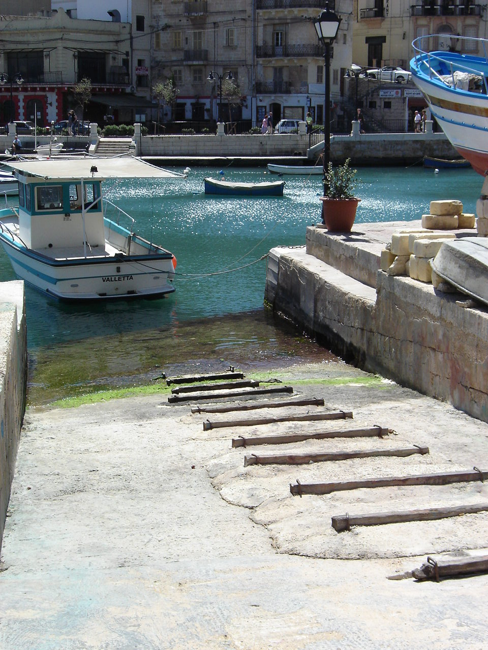 Boote und marine Anlagen, Zubehör und Details. Malta, April 2006. Ältere Form eines Bootsslips mit Muskel oder Windenkraft, um Boote heraus/herein ins Wasser zu lassen.